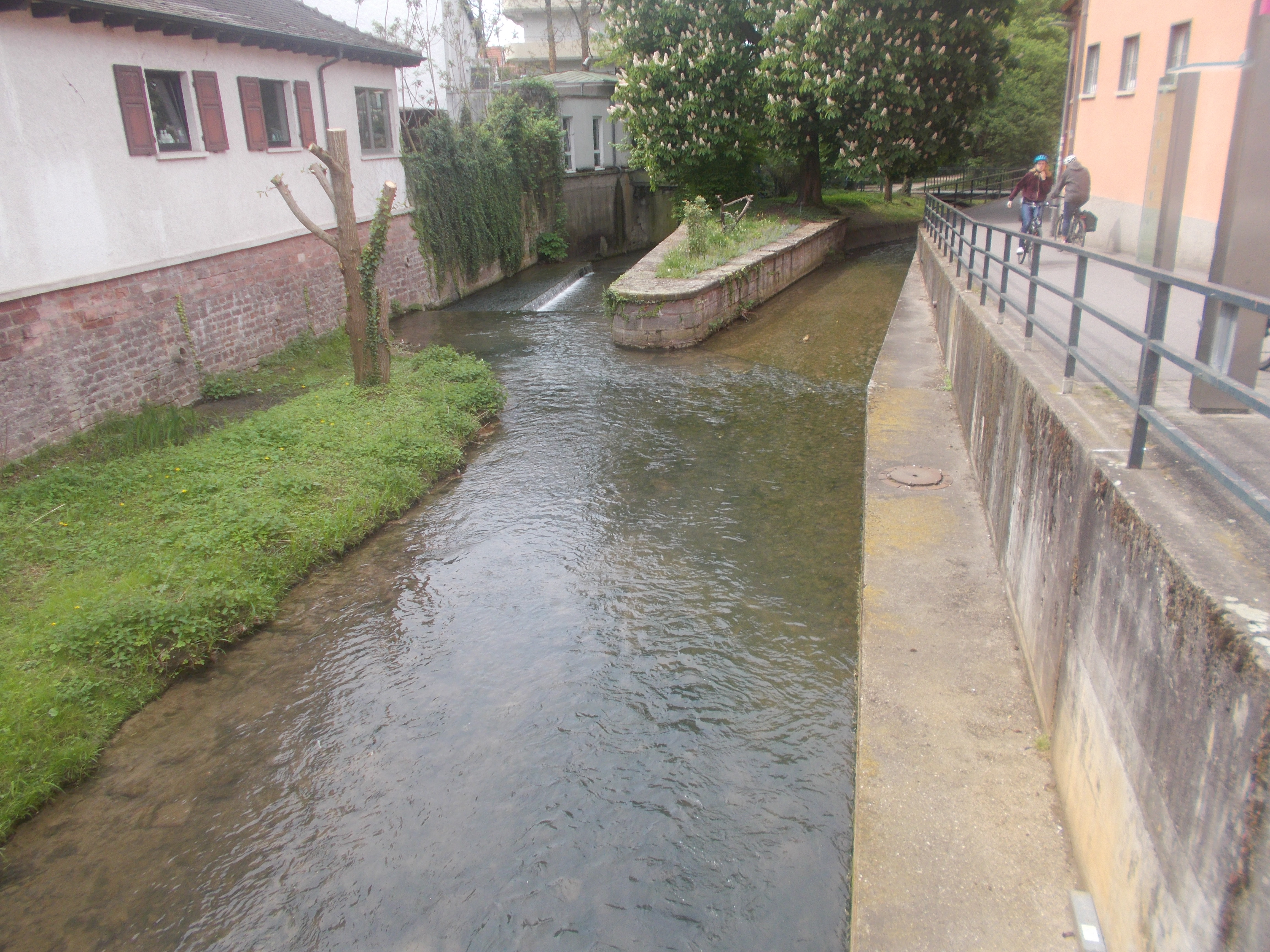 Leimbach im Stadtzentrum von Wiesloch-Walldorf